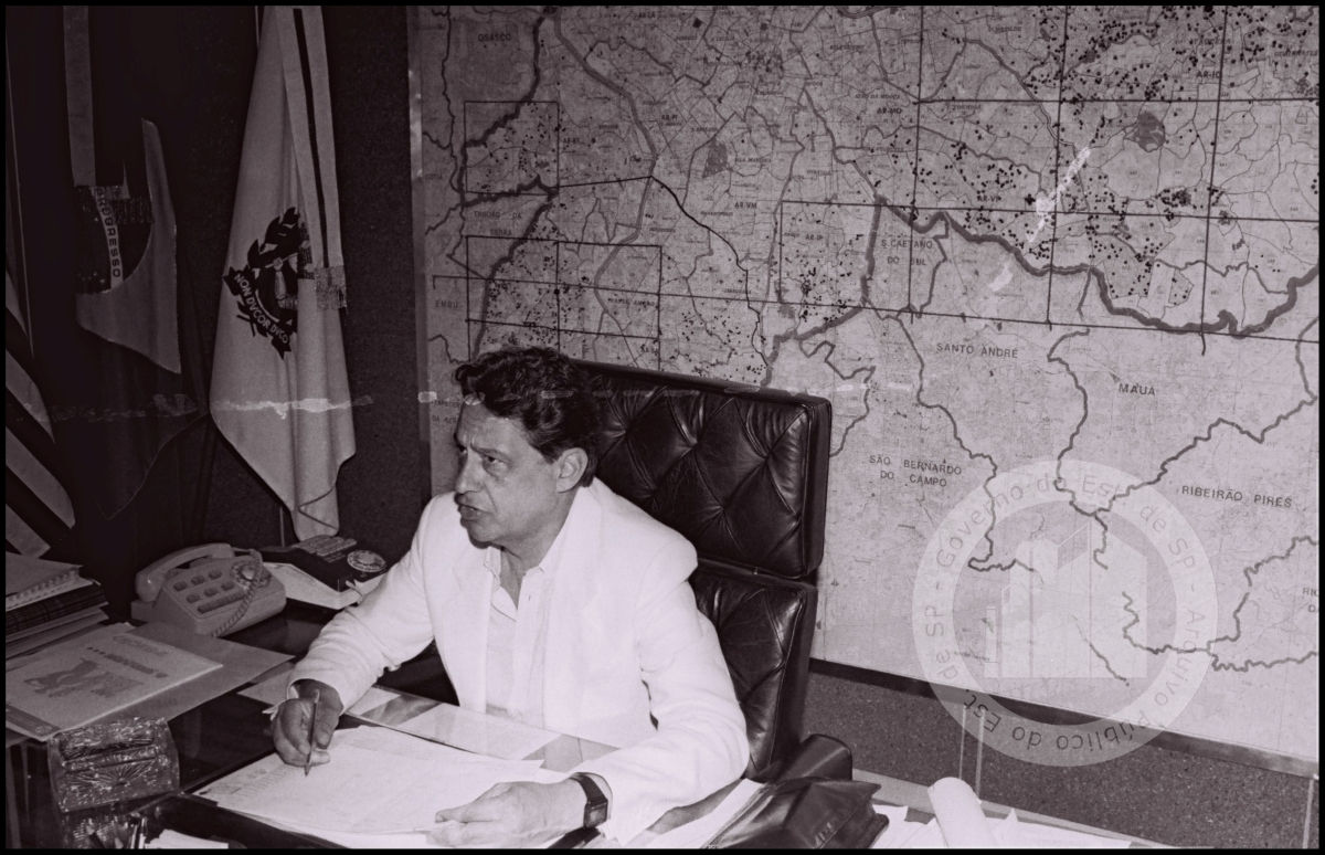 O senador e candidato à prefeito Fernando Henrique Cardoso sentado na cadeira de prefeito, durante visita ao prefeito Mário Covas na véspera da Eleição municipal de São Paulo em 1985. A imagem, retratada por vários fotógrafos, estampou a capa dos principais jornais no dia da eleição e causou prejuízo para Cardoso (então primeiro colocado nas pesquisas), que acabou perdendo a eleição para o ex-presidente Jânio Quadros. Imagem do Acervo Mário Covas sob a guarda do Arquivo Público do Estado de São Paulo, código CPREFMC 024 032